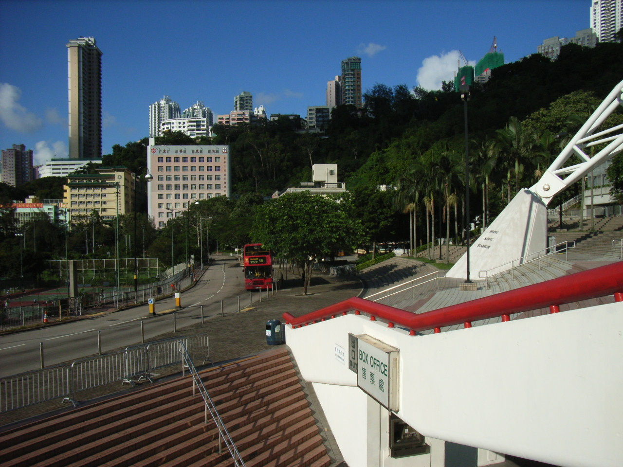 中文（香港）: 東院道（Eastern Hospital Road），是香港島銅鑼灣南部掃桿埔的一條街道。